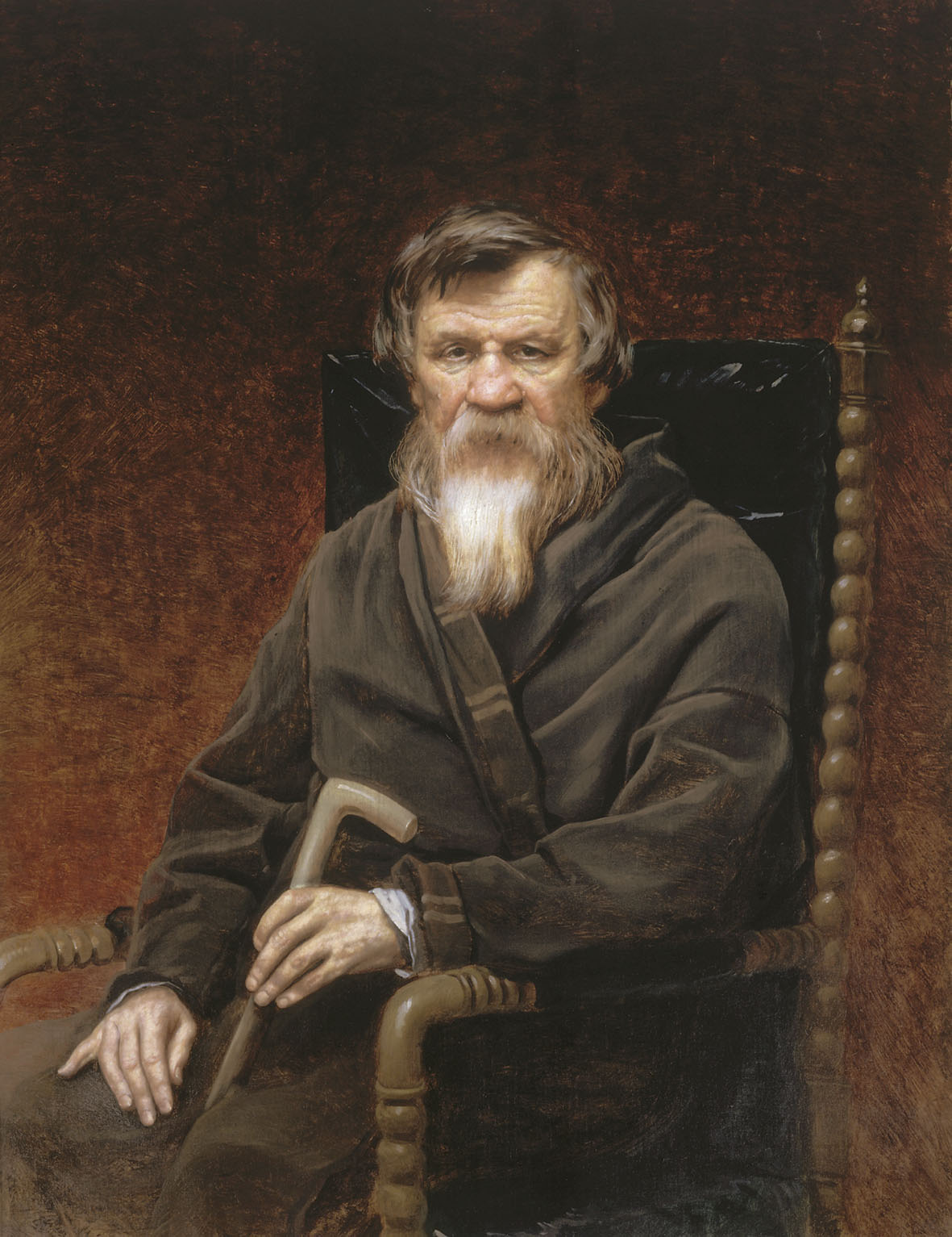 Портрет историка Михаила Петровича Погодина